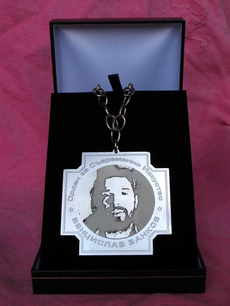 Железен орден за съвременно изкуство "Венцислав Занков" - материал неръждаема стомана 3мм, гравиран